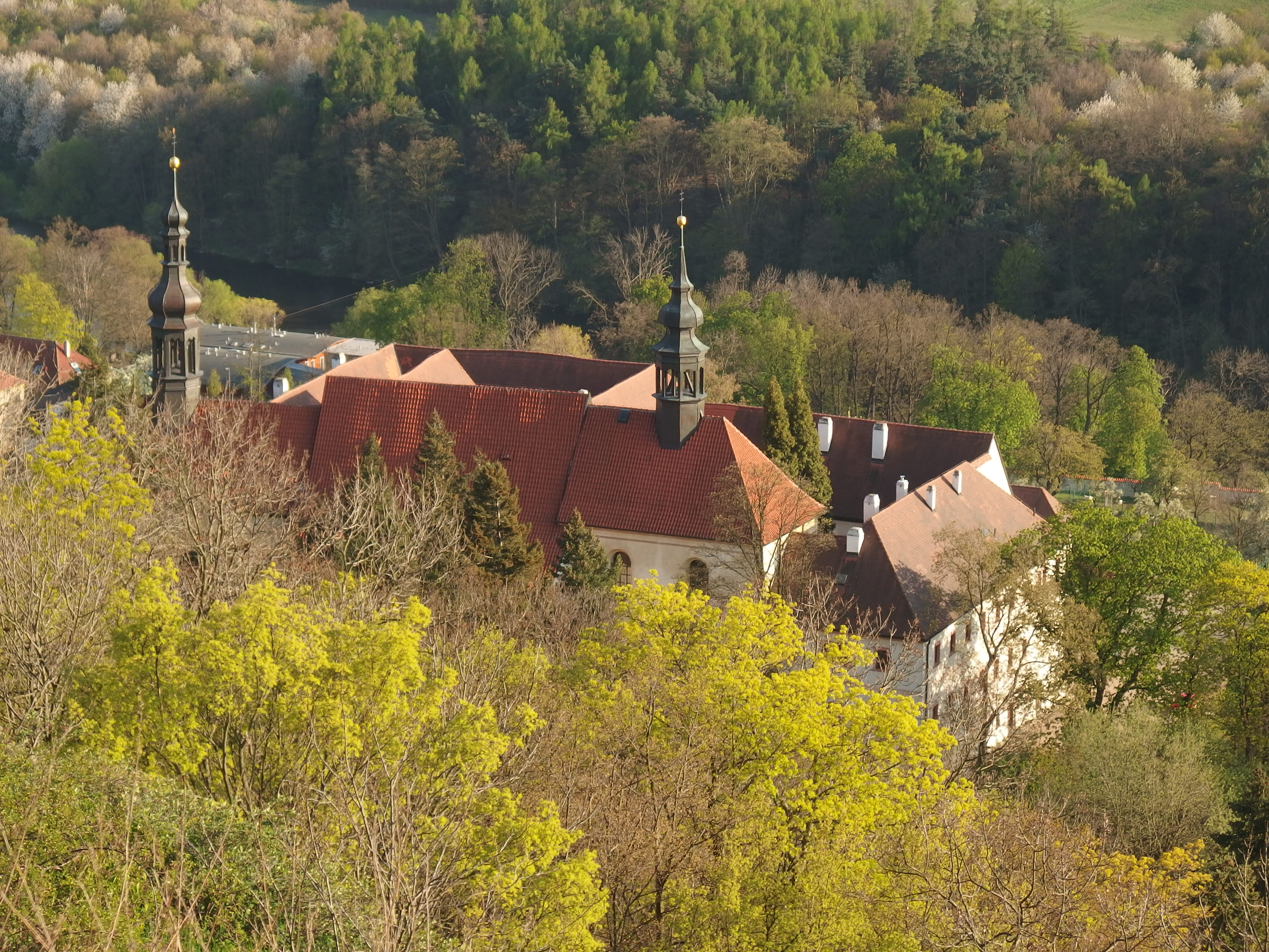 Františkánský klášter Čtrnácti sv. Pomocníků, Jana Švermy 474, Kadaň.